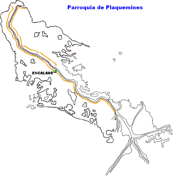 Encalade, (LA)